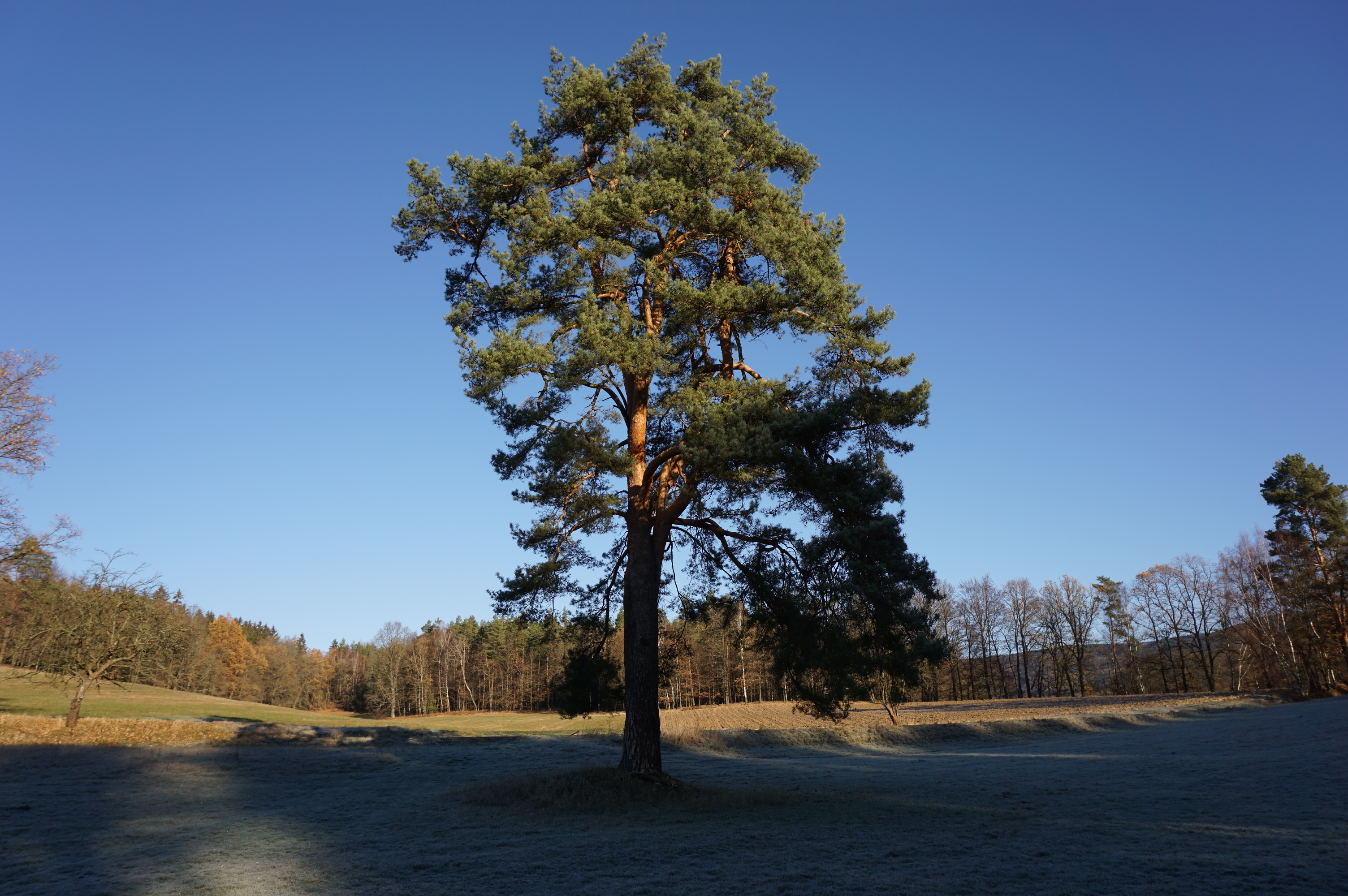 Žibřidice - památná borovice lesní jižně od silnice do Zdislavy